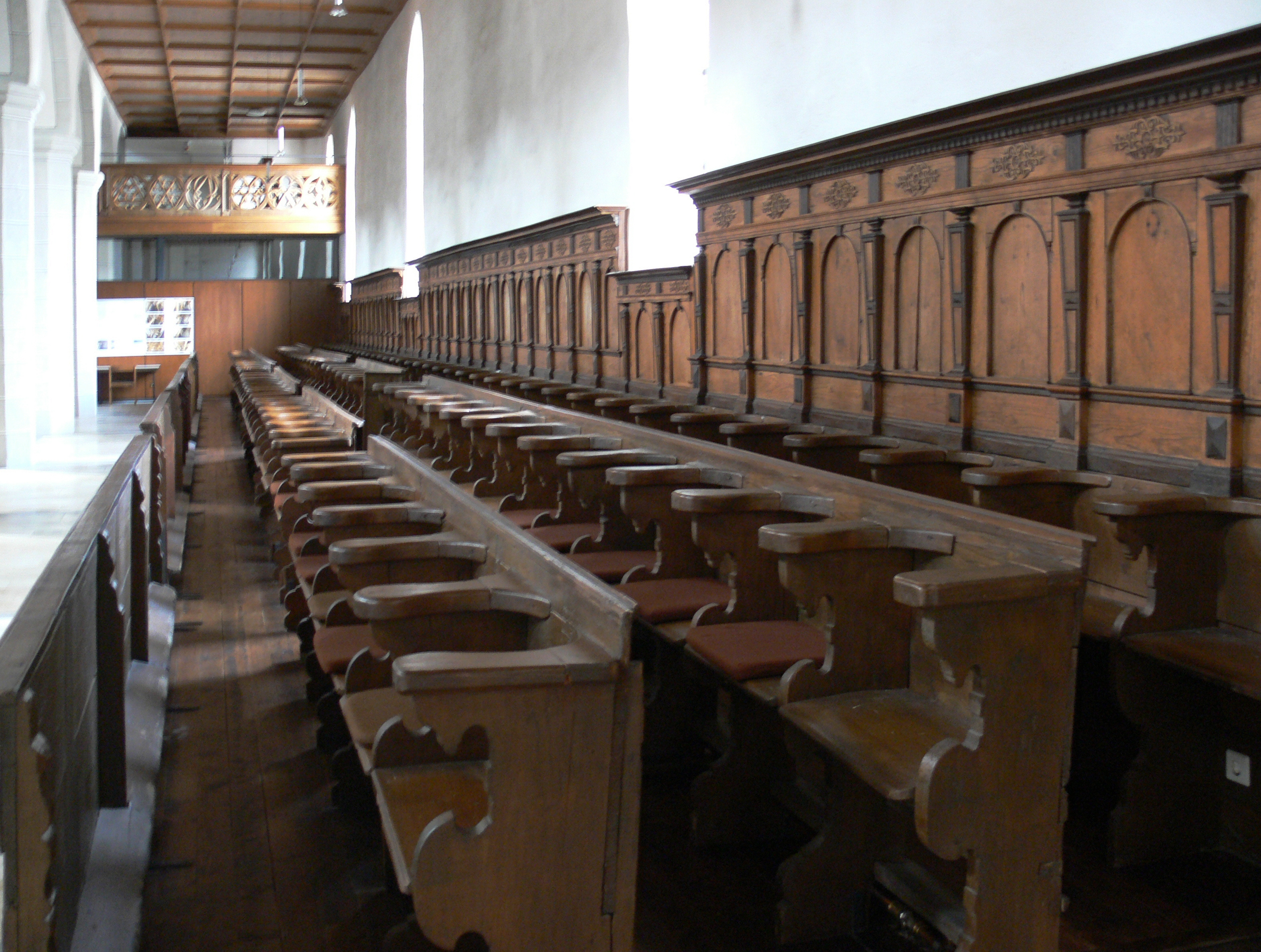 Isny im Allgäu, Nikolaikirche, Kirchengestühl